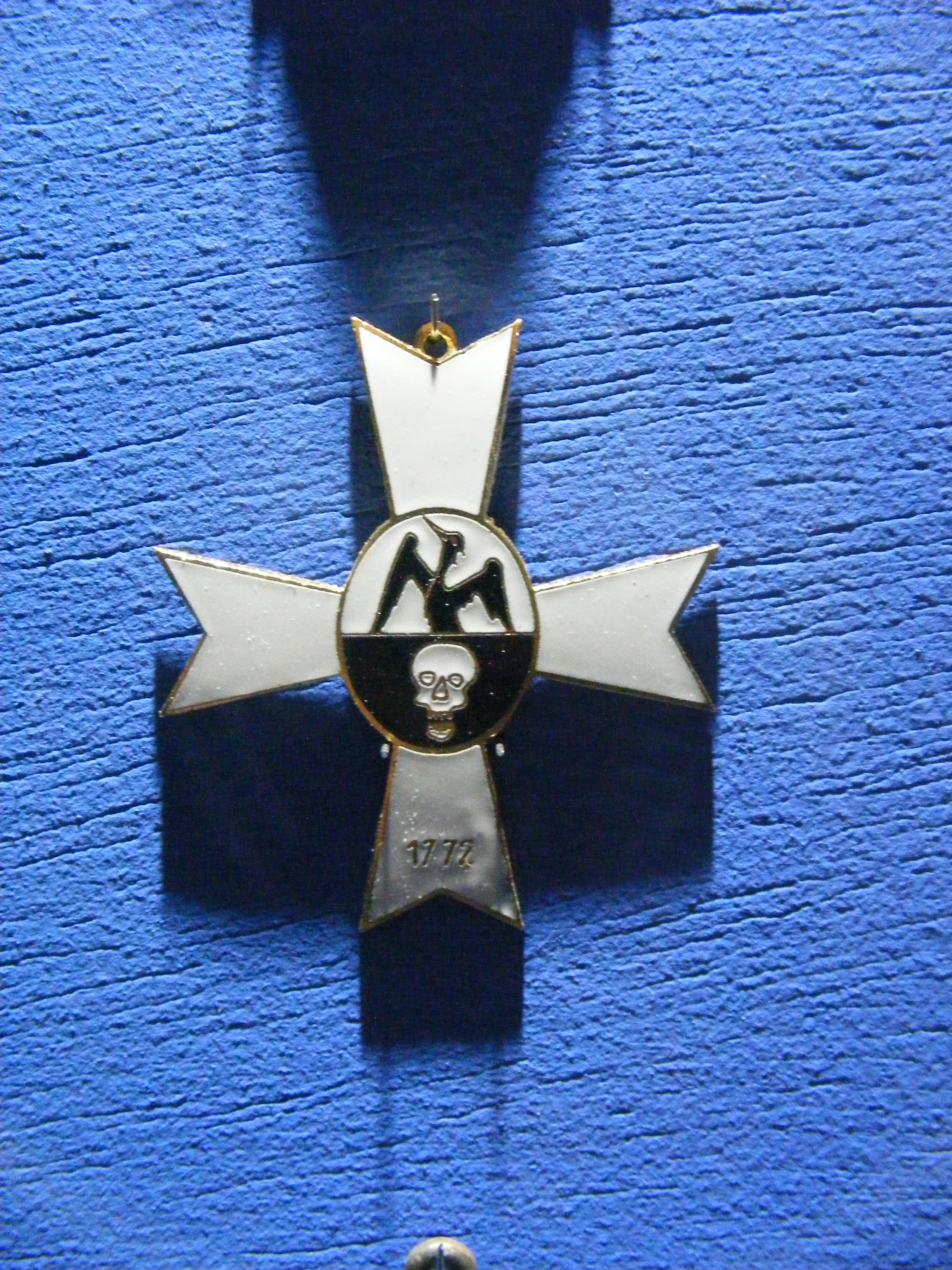 Bayreuth, Deutsches Freimaurermuseum — Bijou (Zum Todtenkopf und Phoenix, Berlin)